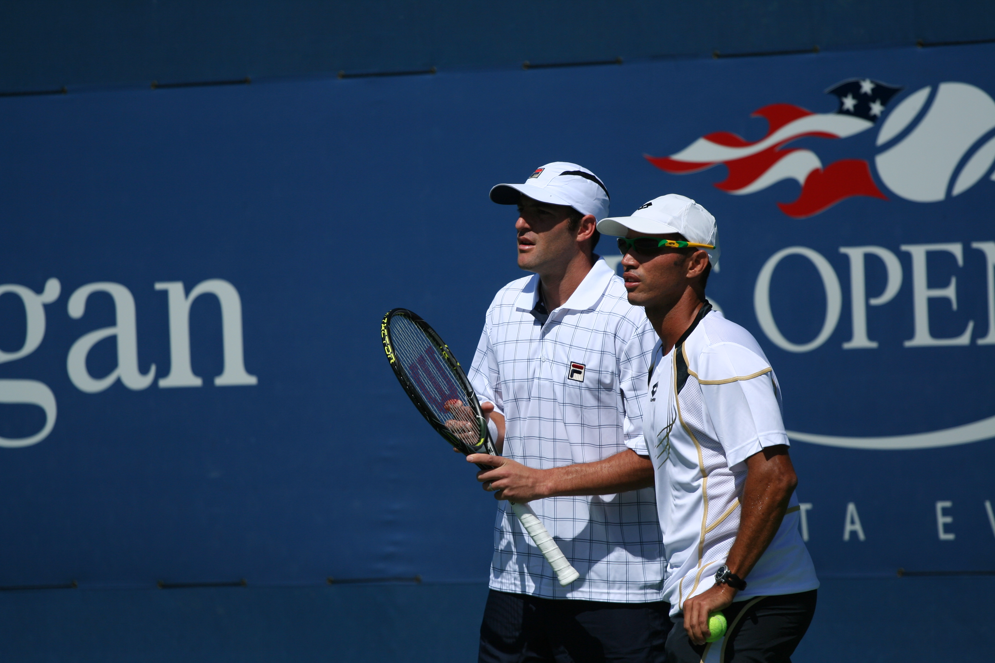 U.S. Open Wednesday, Sept. 2, 2009